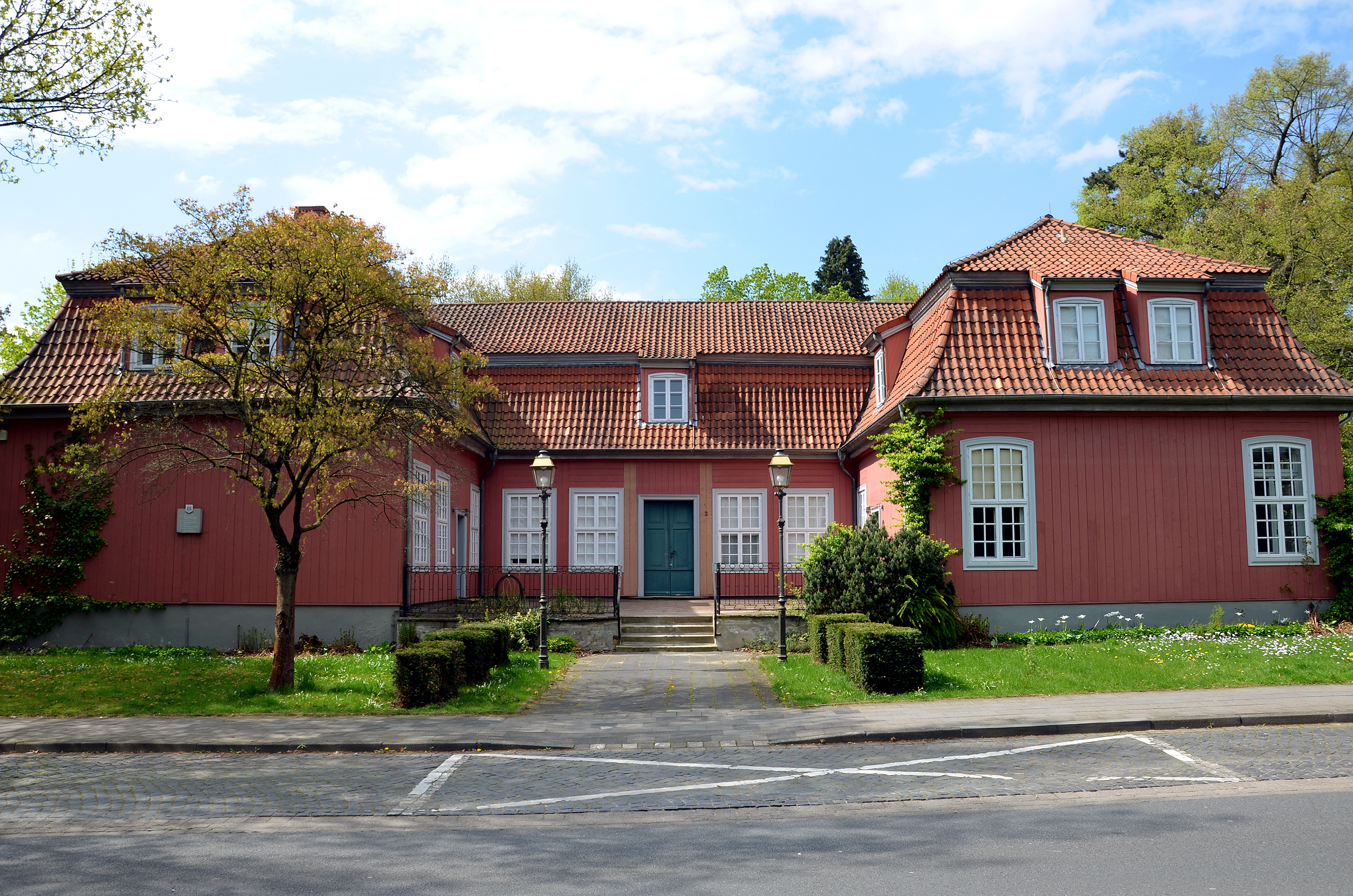 Das denkmalgeschützte, um 1770 für Prinz Ernst von Mecklenburg-Strelitz erbaute Palais Mecklenburg in Celle (Prinzengarten 2), Ansicht vom Stadtfriedhof Celle ...